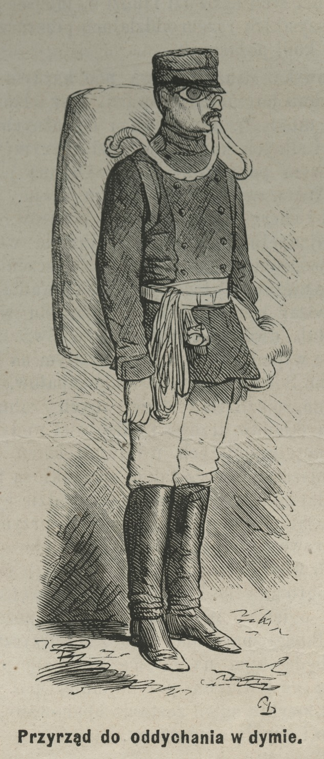 Przyrząd do oddychania w dymie Warszawska Straż Ogniowa